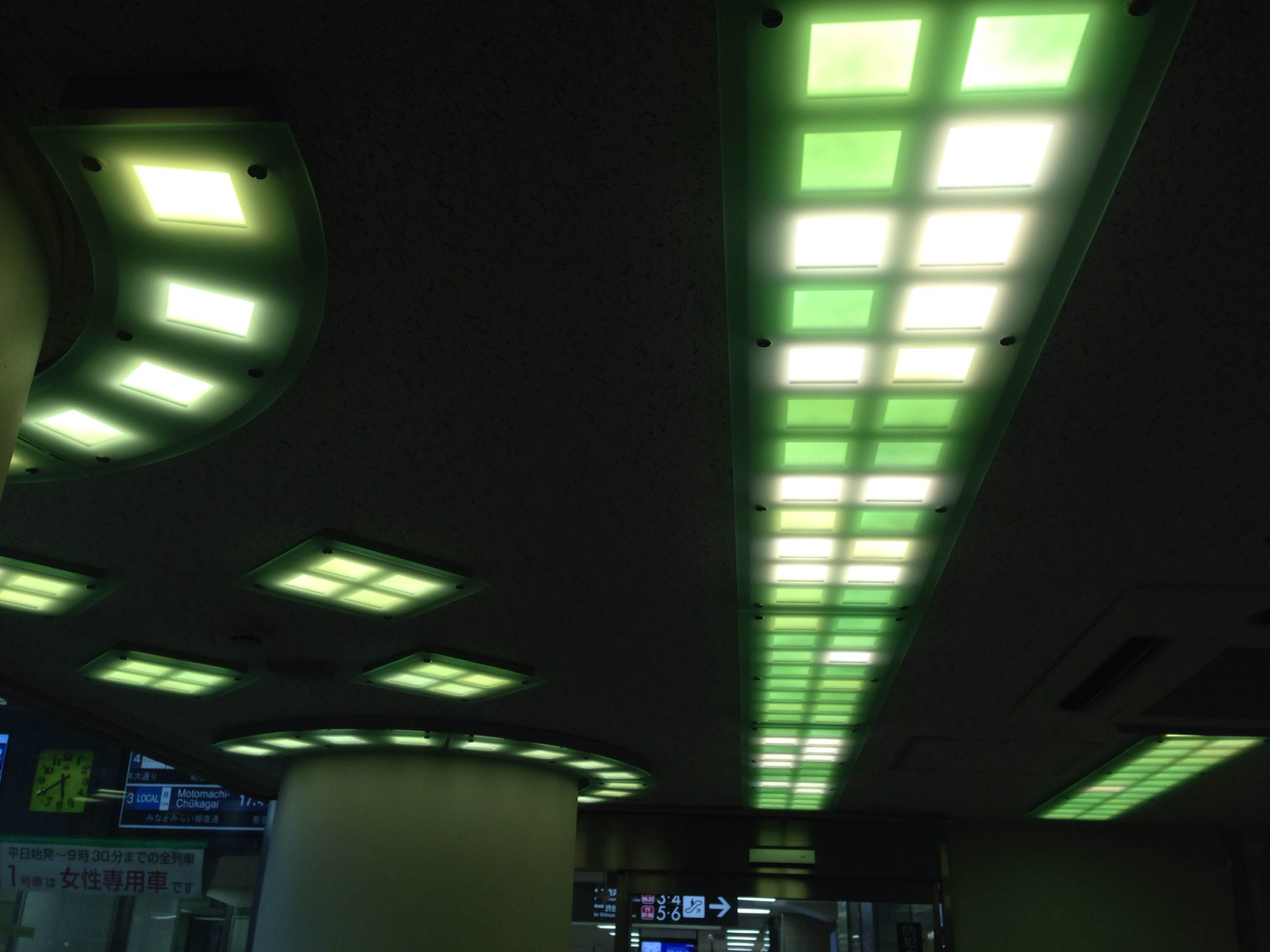 自由が丘駅正面口シースルー改札口に設置されている有機EL照明。